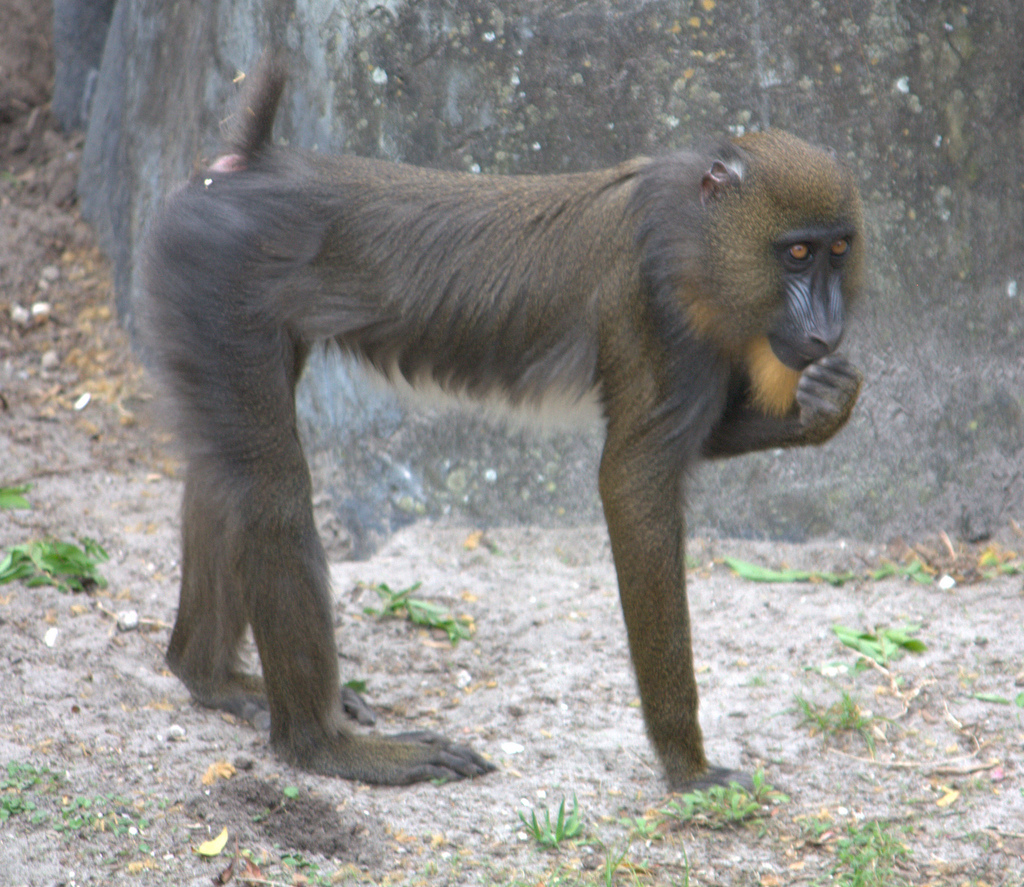 Mandrill